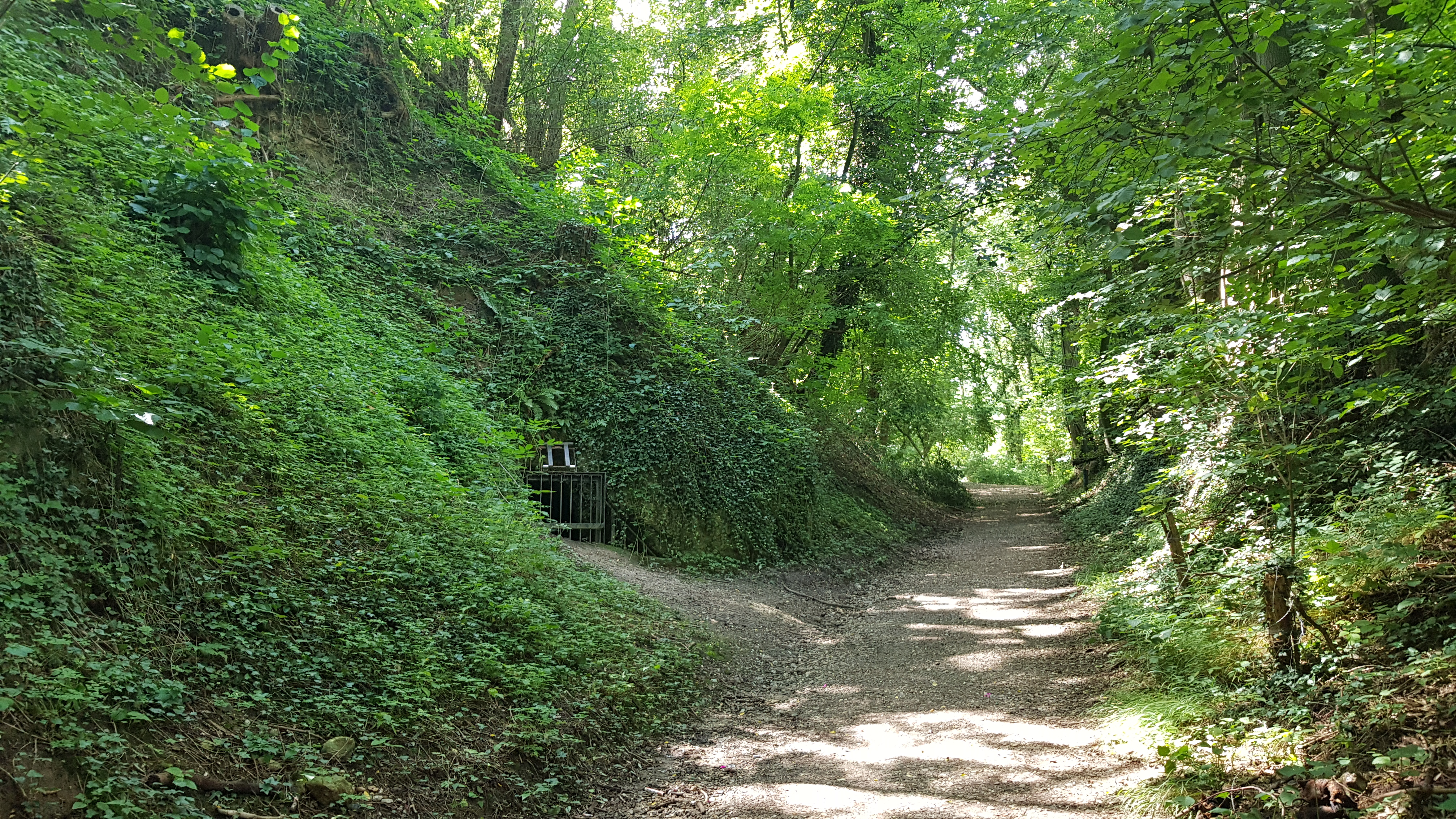 Musschenputgroeve, Geulhem, Nederland